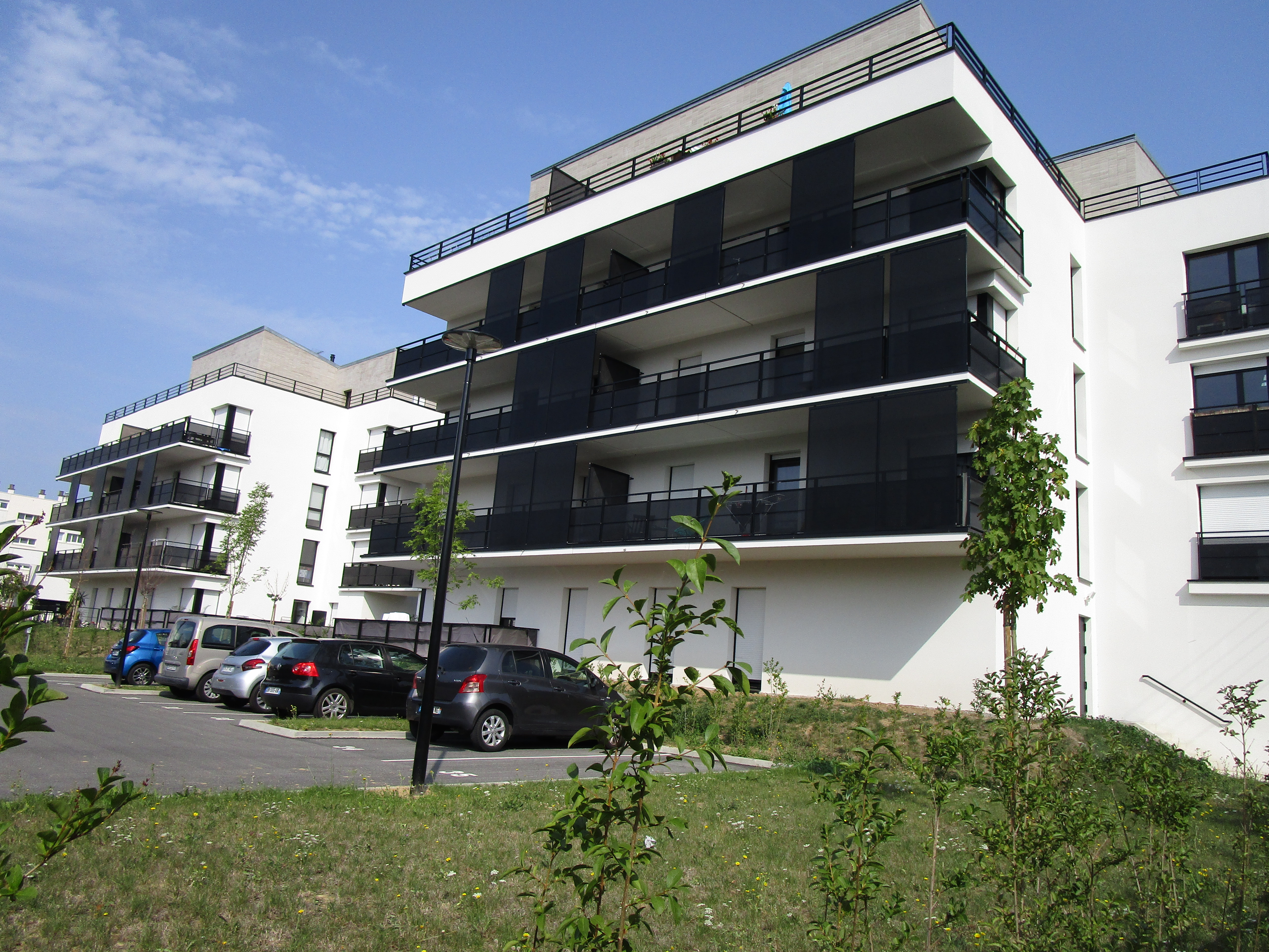 La nouvelle cité du Petit-Beaumont, qui loge des militaires au sein du quartier Giraudeau de Tours